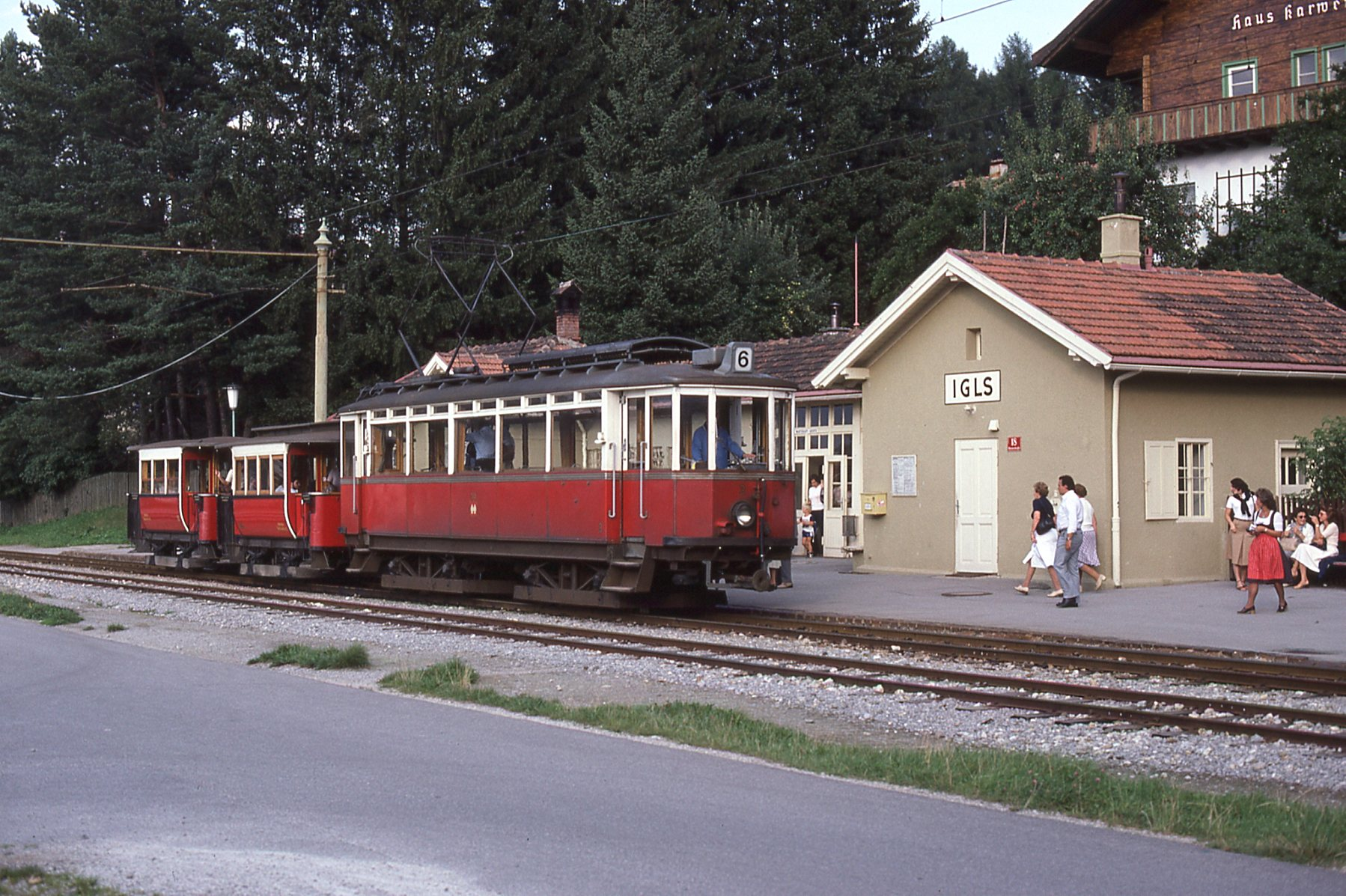 Zug der Mittelgebirgsbahn kommt in Igls an